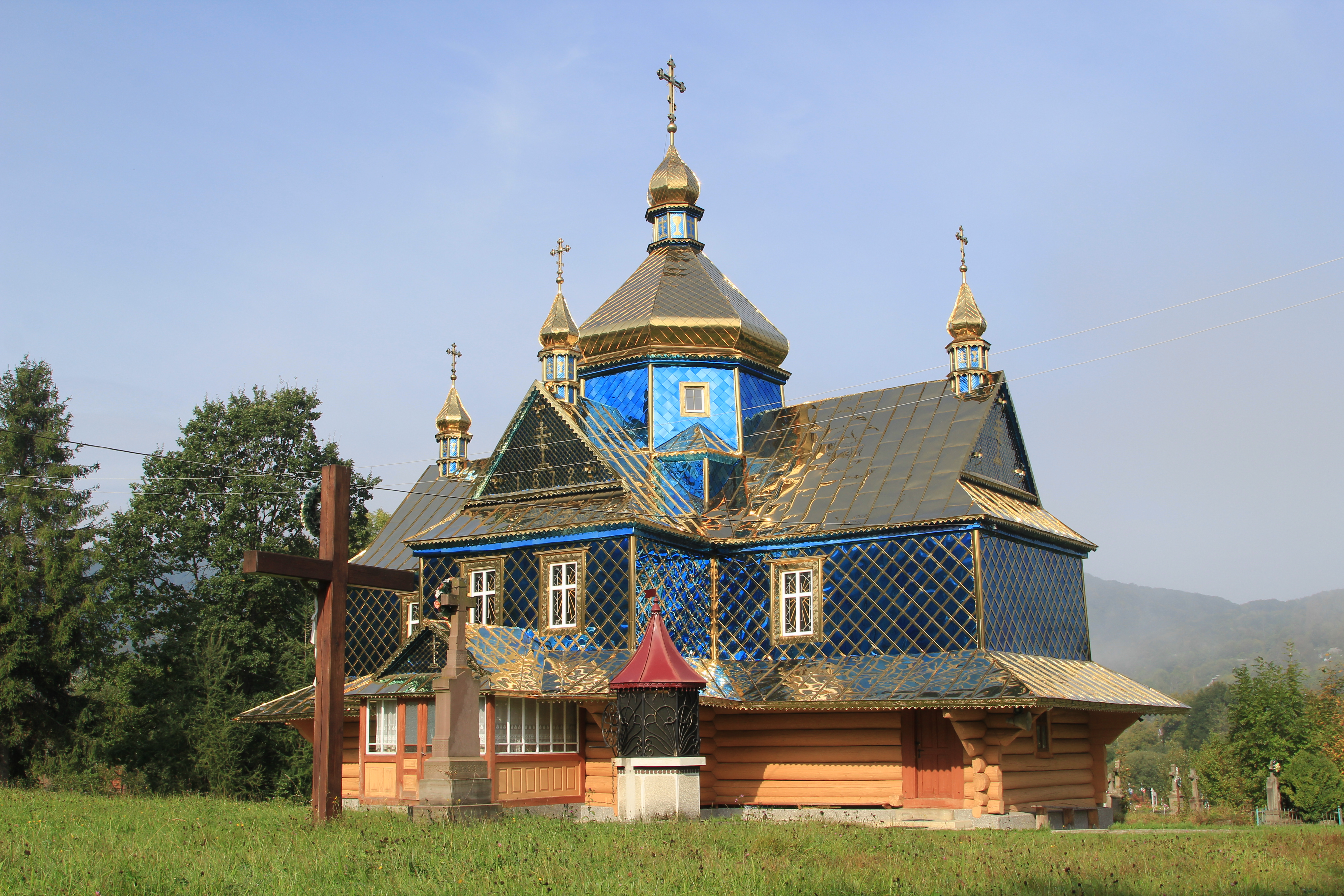 Церква Св. Стефана (дер.), Город